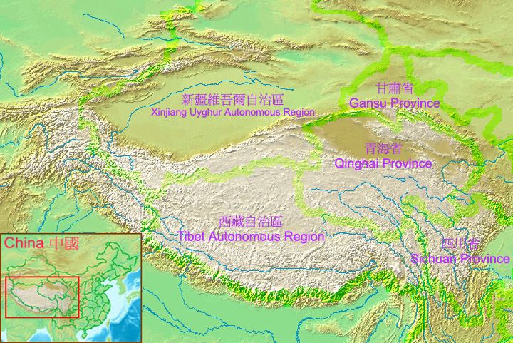 青藏高原地勢 (由Alan Mak以Wikimedia Commons的一幅世界地圖為基礎繪畫)